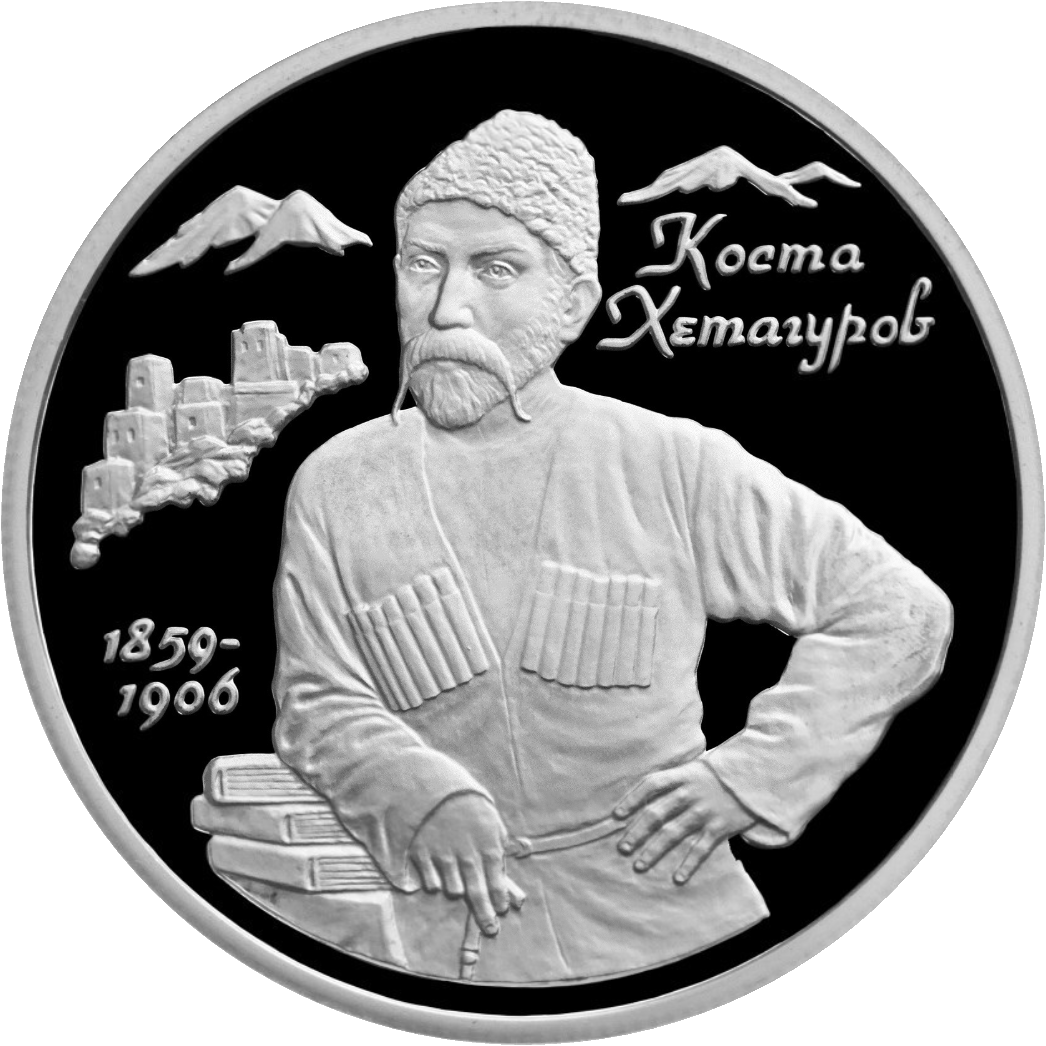 Монета Банка России — Серия: «Выдающиеся личности России», 140-летие со дня рождения К.Л. Хетагурова, 2 рубля, реверс.